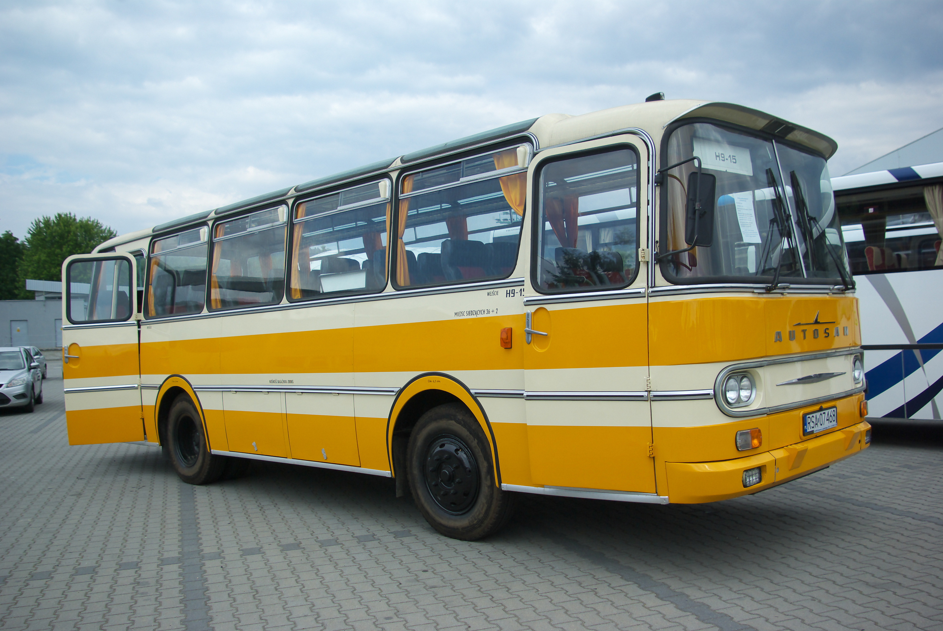 Model autobusu Autosan H9-15 (rocznik 1977) wystawiony przy Arenie Sanok w 2014